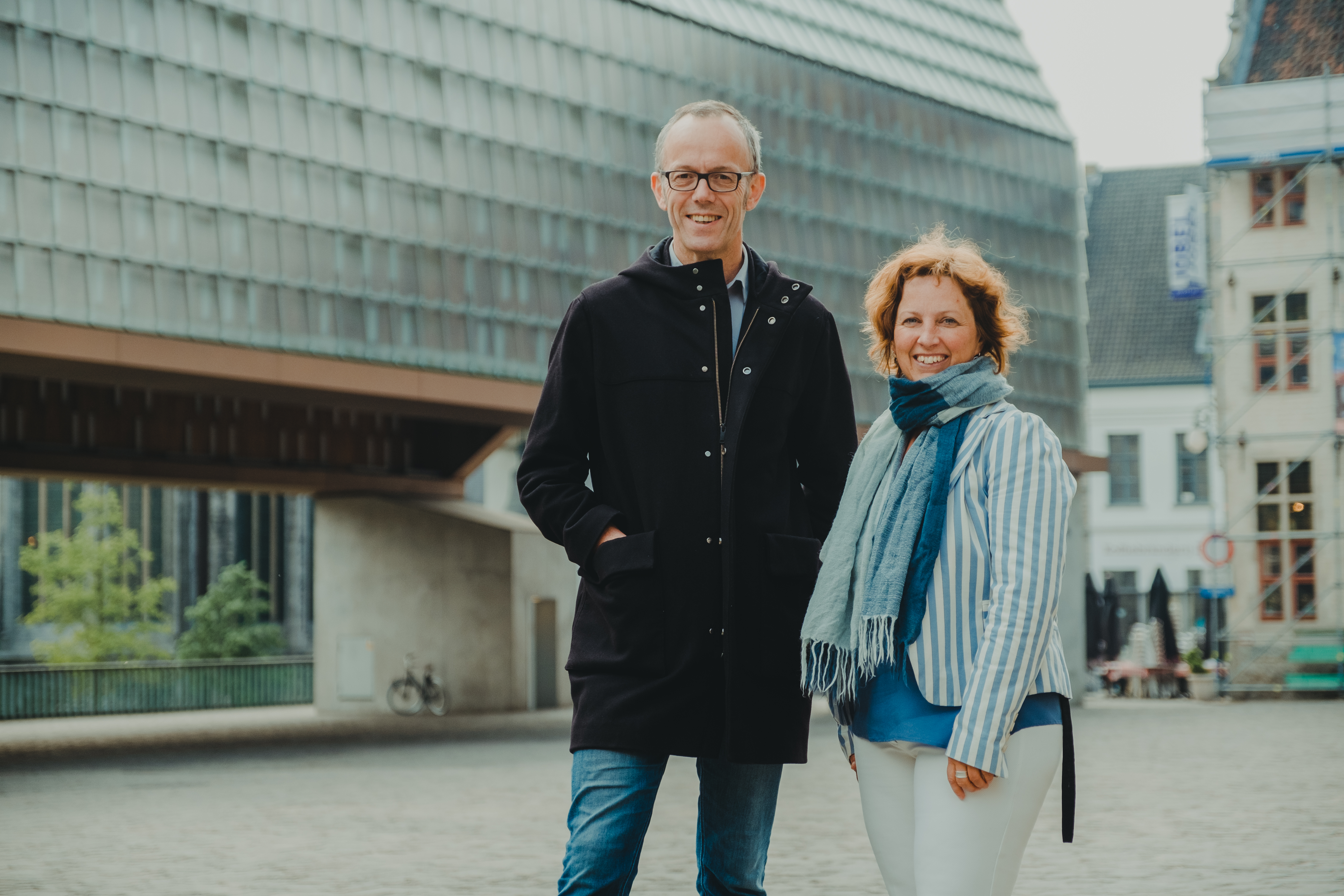 Mieke Schauvliege met Gentse schepen Filip Watteeuw